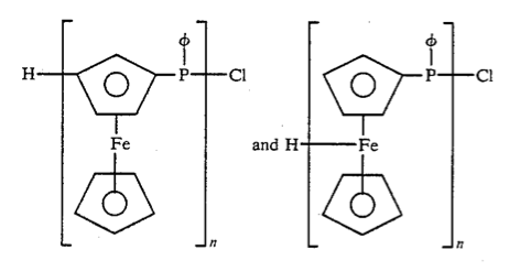 polimerització Ferrocè